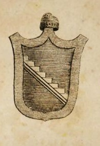 Wappen des 53 Dogen Bortolomeo Gradenigo